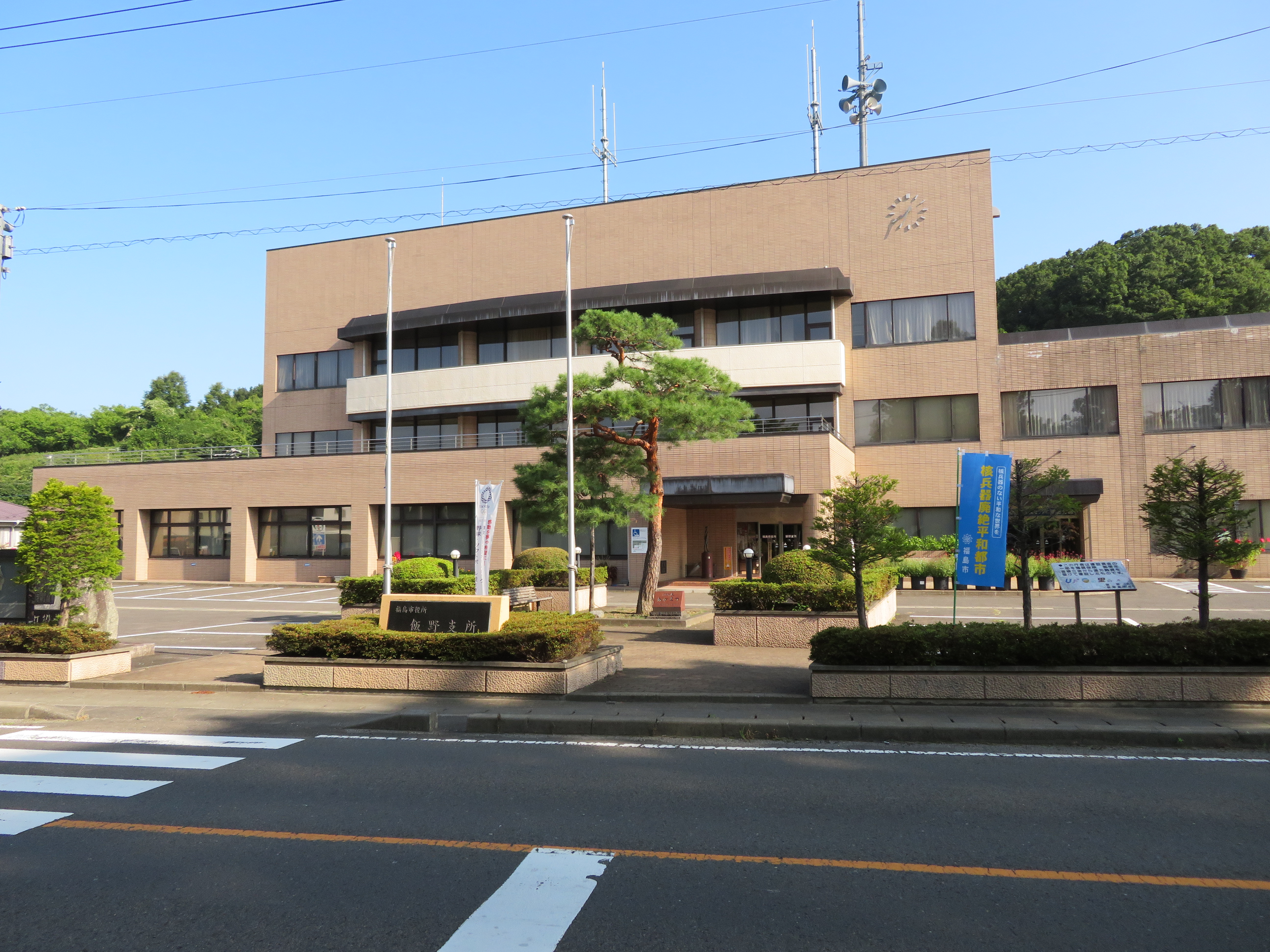 福島市役所飯野支所庁舎（旧飯野町役場庁舎） Canon PowerShot SX720 HS